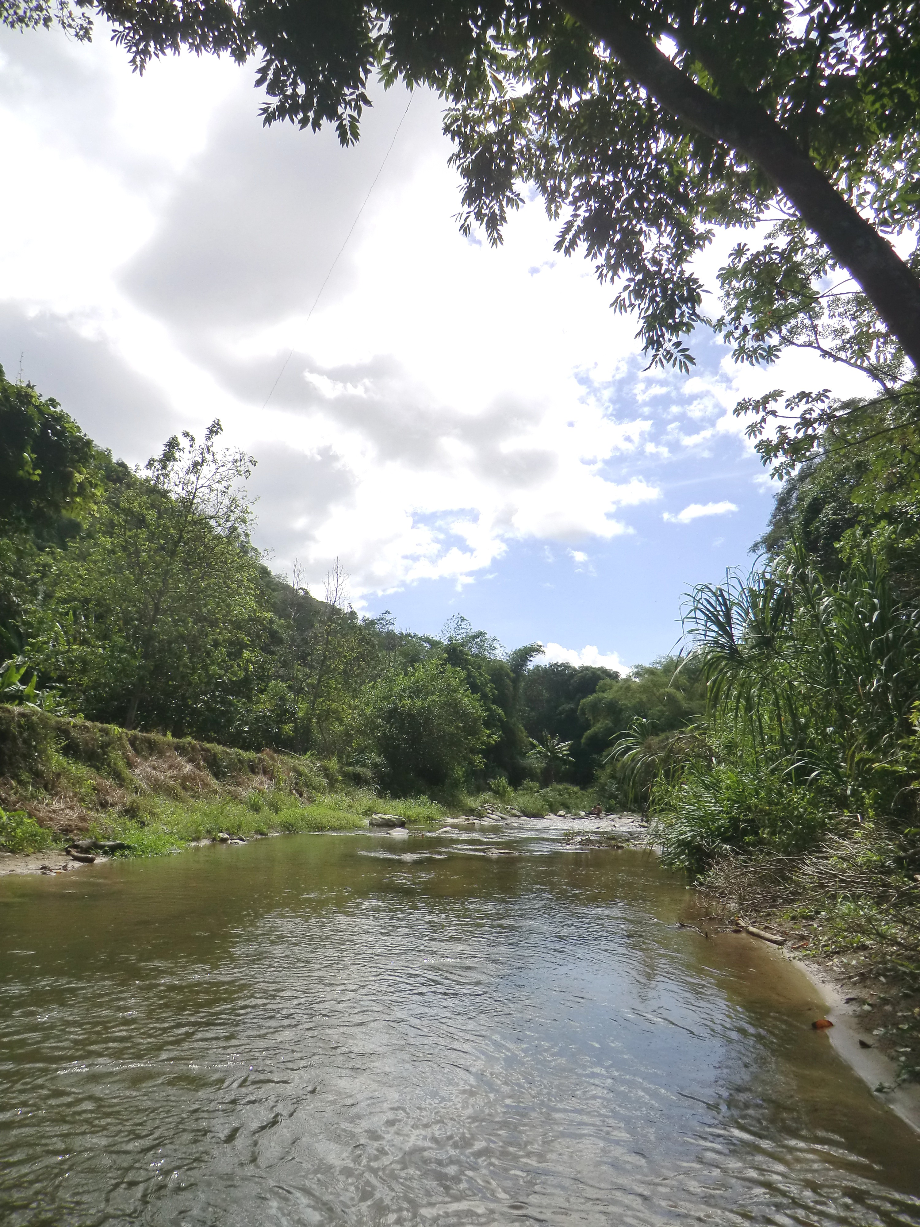 Río que atraviesa la ciudad de Guatire, en el estado Miranda, Venezuela